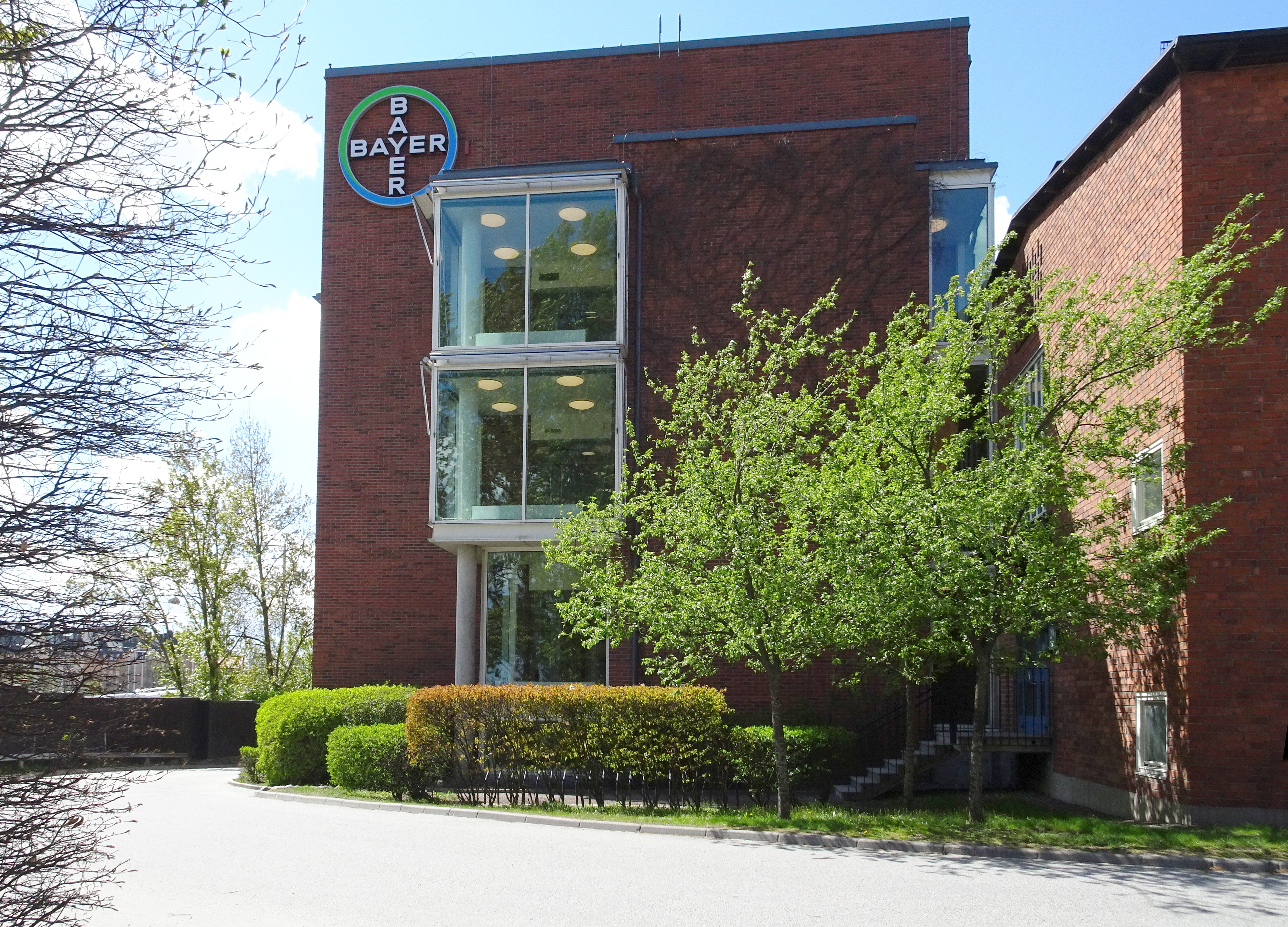 CGB Laboratoriet (Centrum för Genomik och Bioinformatik), Berzelius väg 35, byggår 2001, arkitekt Bjurström & Brodin arkitektkontor